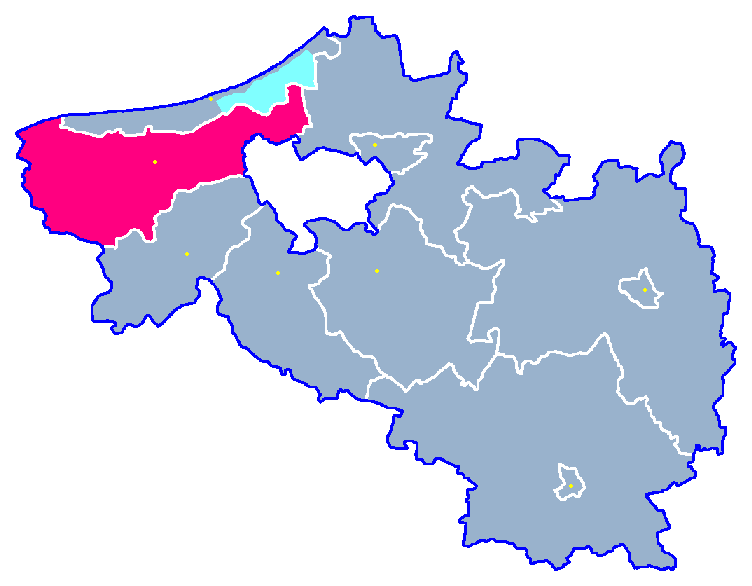 Locator maps for communes in województwo zachodniopomorskie : Będzino gm.png (podział na gminy)